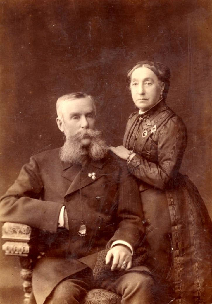 Константин Андреевич Лишин и его жена Роксандра Лишина (румынская принцесса), 1898 г.